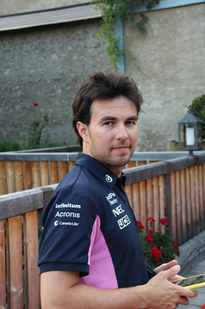 Formula 1 2019 / Schloss Gabelhofen